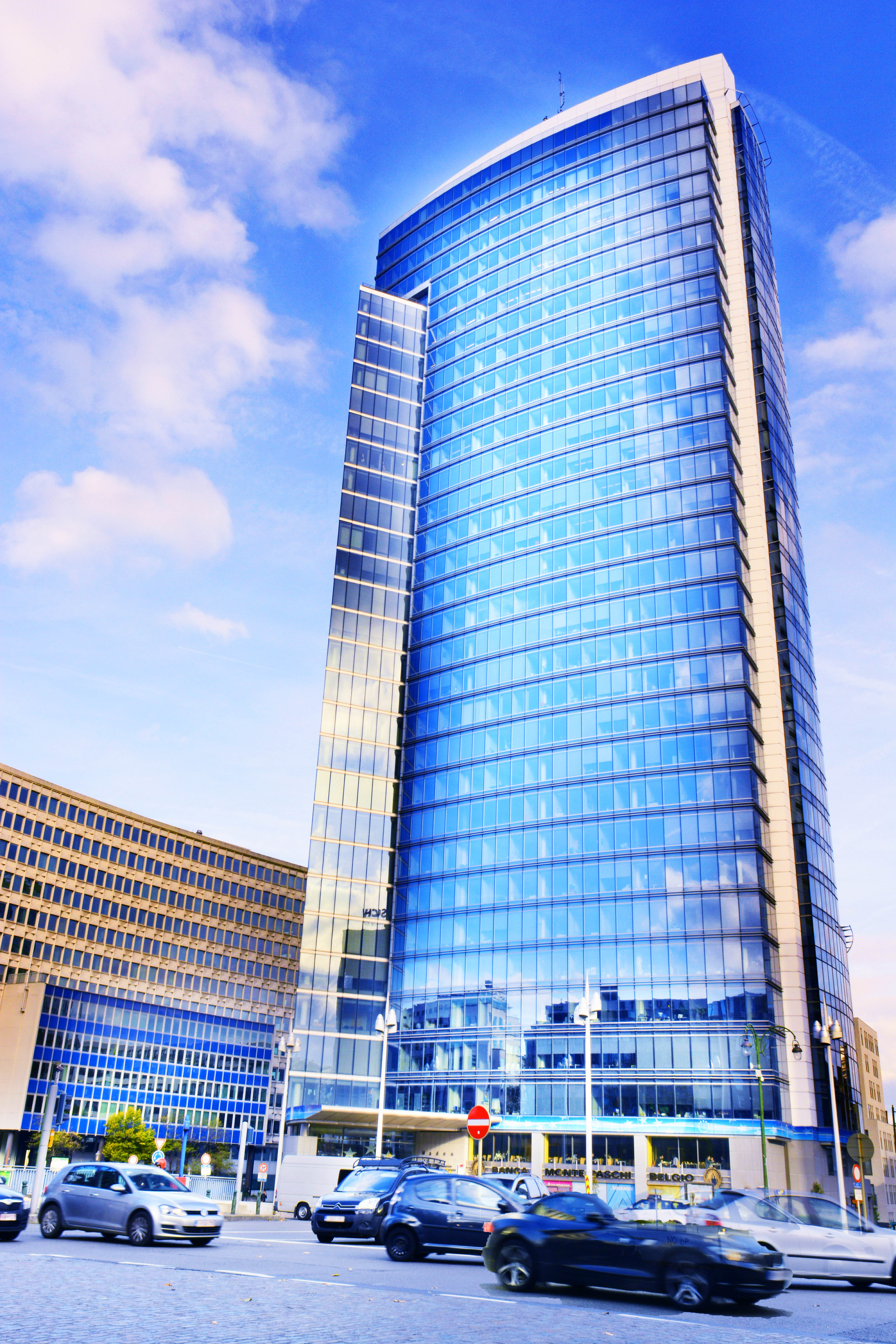 Aussi appelée Madou Plaza